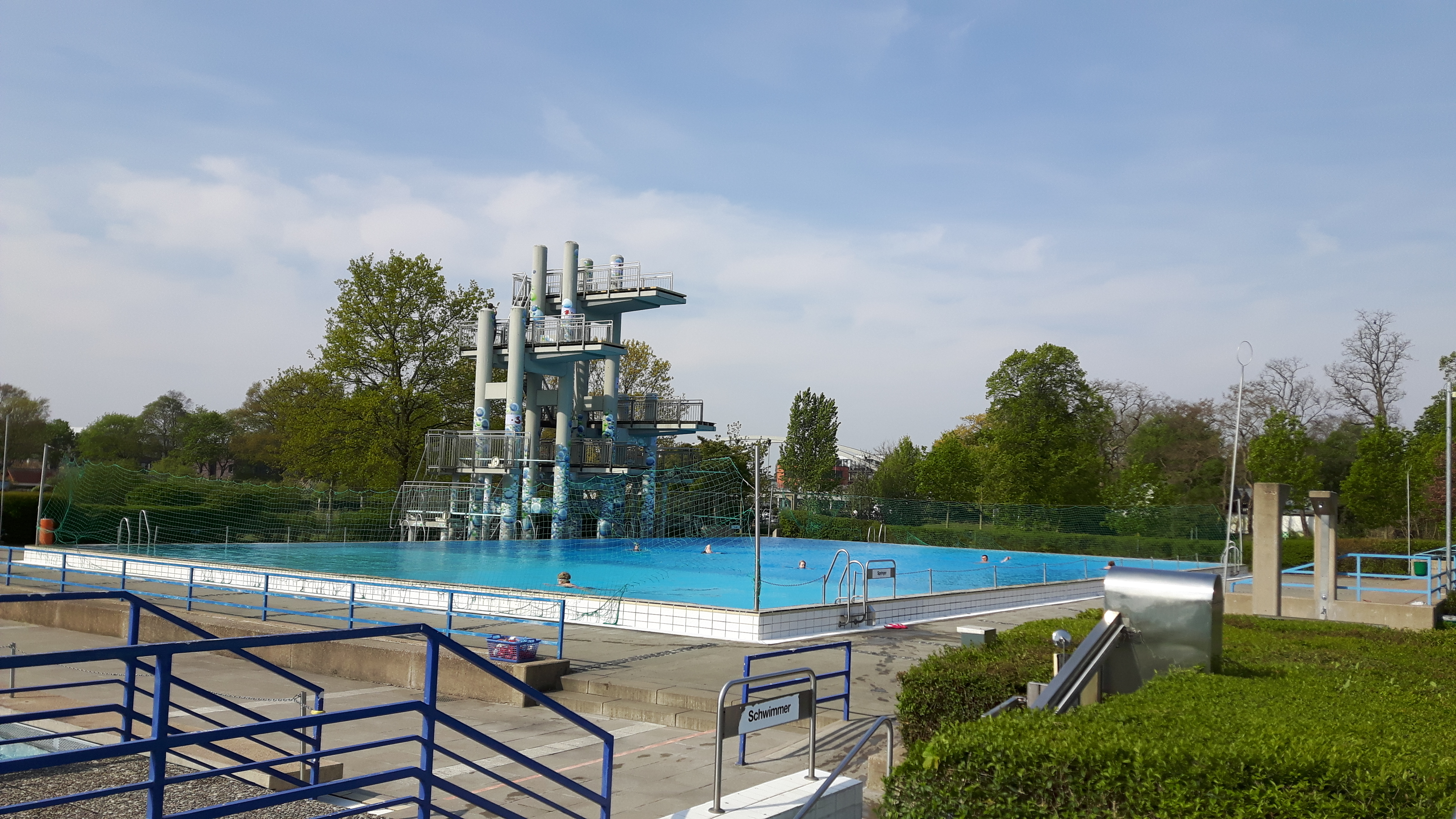 Sprunganlage des Lister Bads, 1.5.2017, Hannover